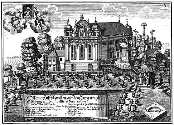 “S. Maria Hilff Kapellen auf dem Berg nächst Vilsbiburg” (Achdorf, heute Stadtteil von Landshut), aus: Historico-Topographica Descriptio. Beschreibung des Churfürsten- u. Hertzogthumbs Ober- und Nidern Bayrn. Rentamt Landshut, 1723